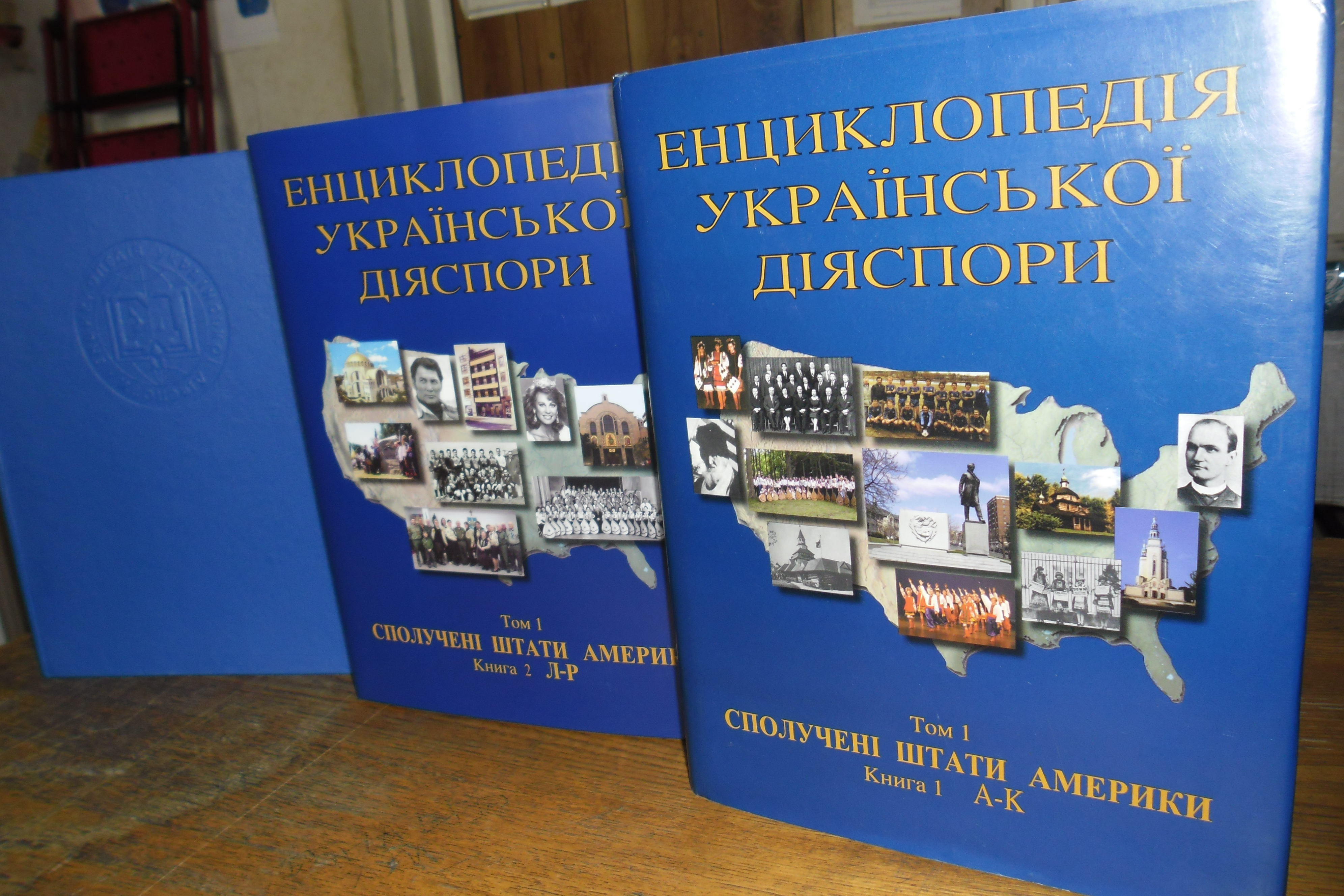 Фото